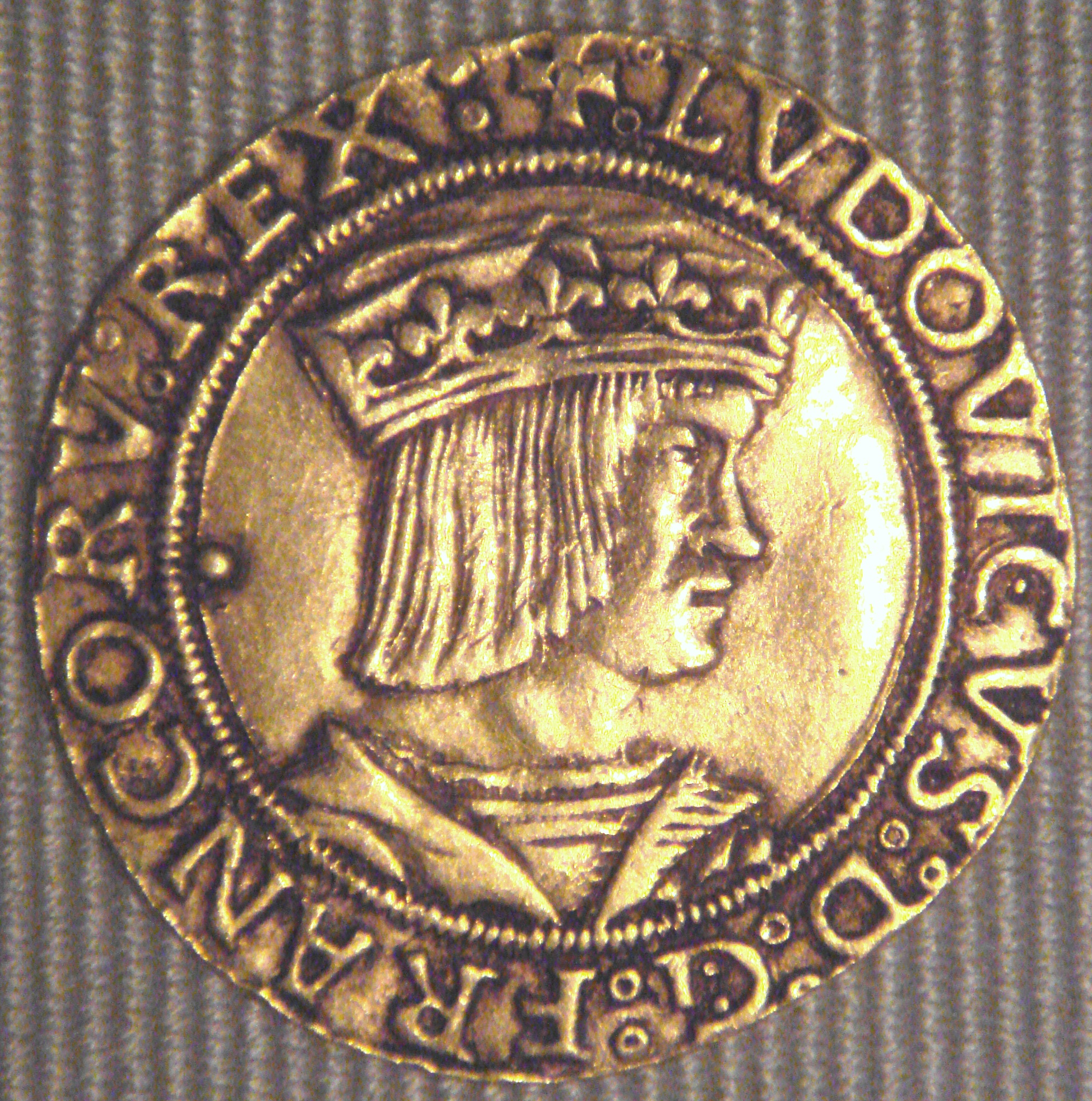 Louis_XII_1514